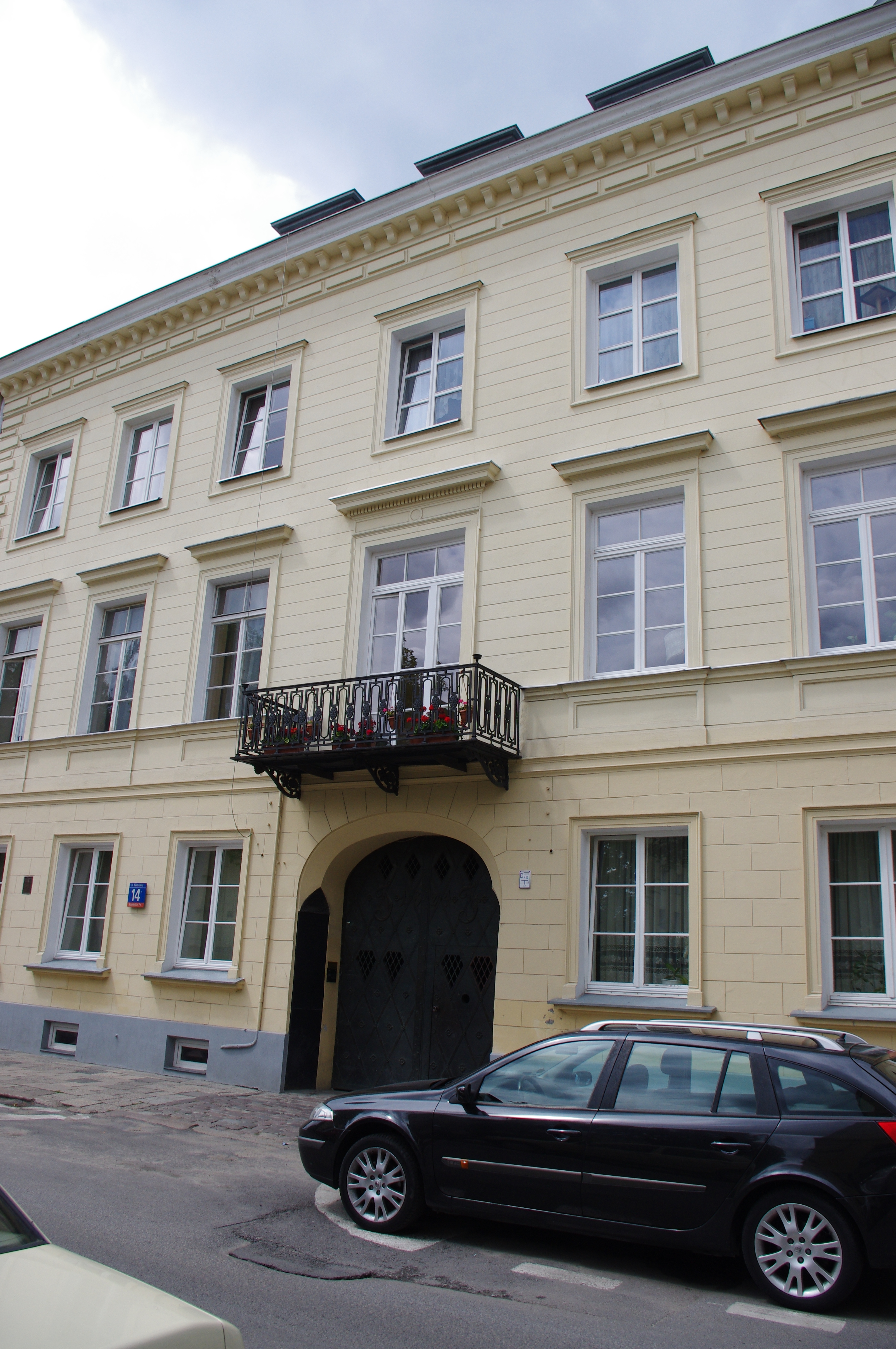 Kamienica Józefa Frageta przy ul. Elektoralnej 16/22 w Warszawie, będąca częścią zespołu fabryki Frageta